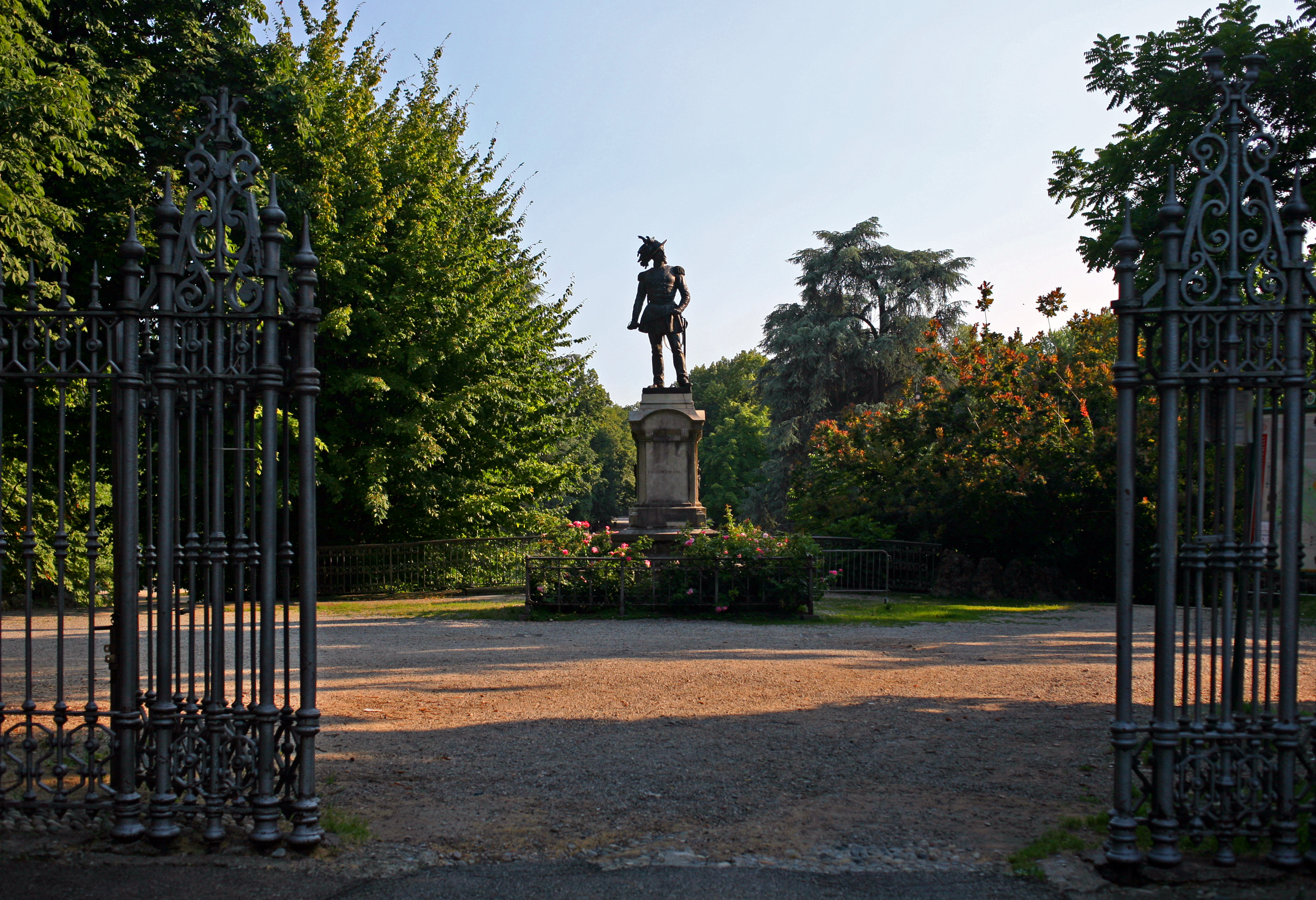 I giardini pubblici di Porta Venezia di Milano, ingresso dai Bastioni con la statia di Luciano Manara dello scultore Francesco Barzaghi (1839-1892)